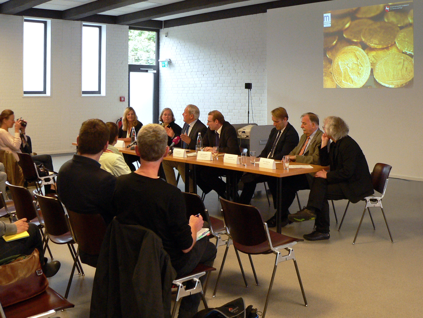 Pressekonferenz zum Münzschatz von Lüneburg im Museum Lüneburg